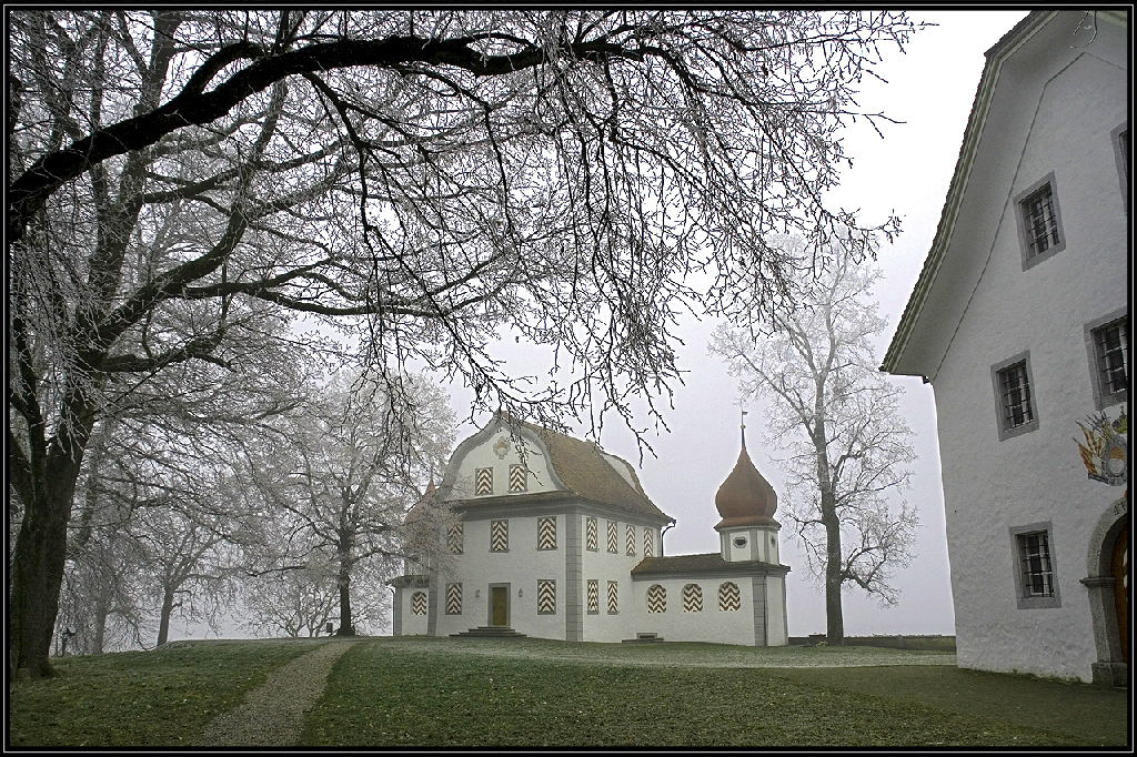 Schützenstube (mitte) und Zeughaus (rechts) auf dem Landenberg in Sarnen.